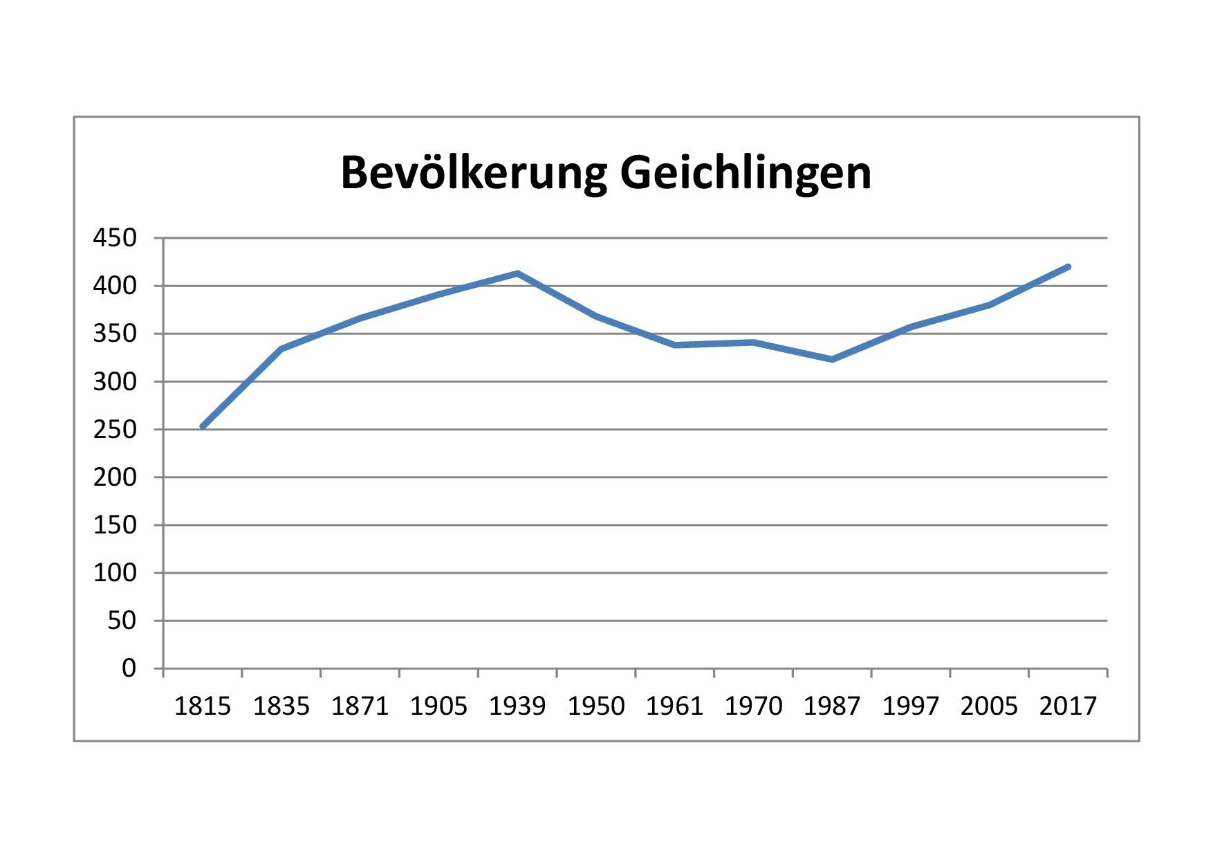 54675 Geichlingen. Grafische Entwicklung der Bevölkerung. Stand 2018.